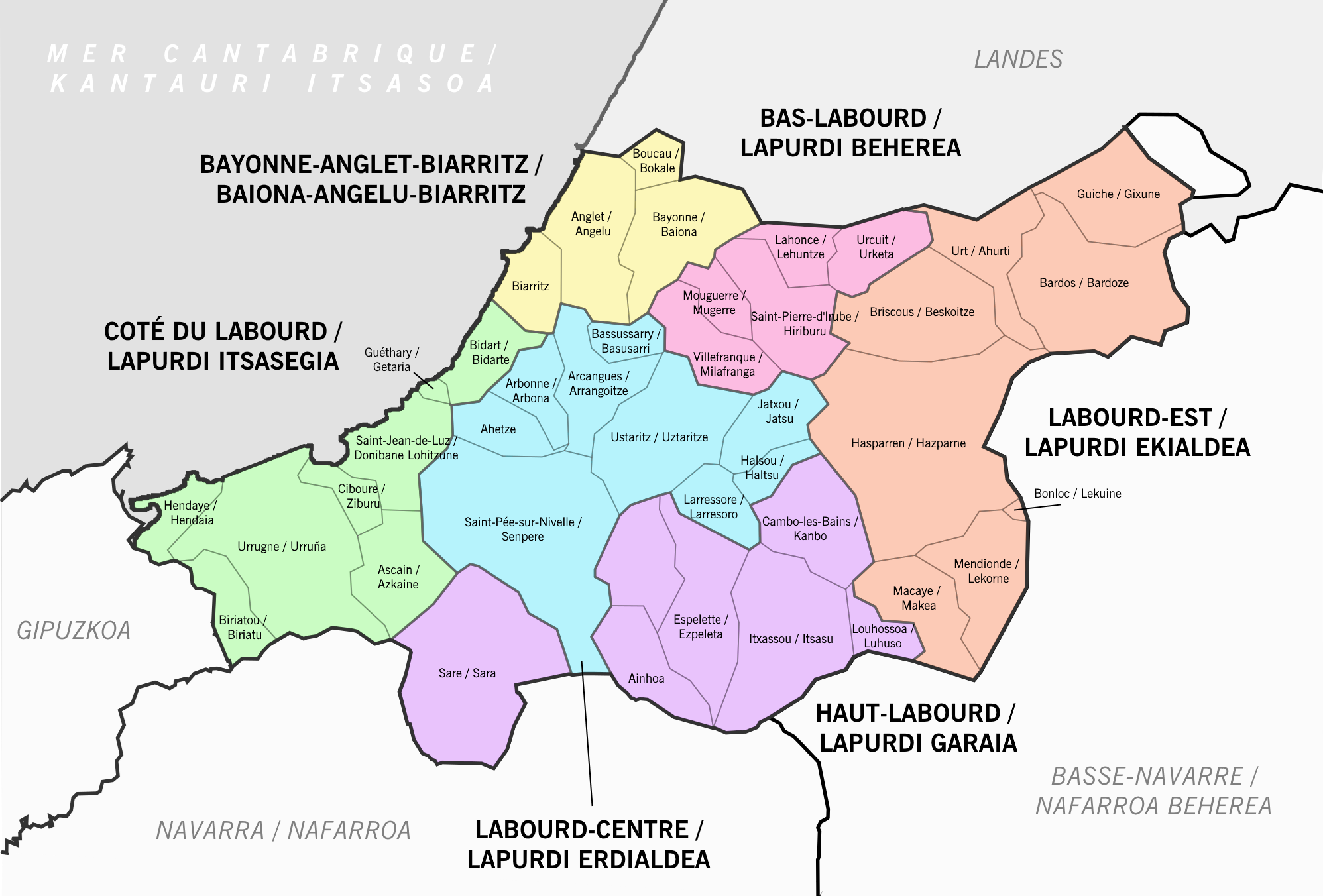 Mapa de Lapurdi